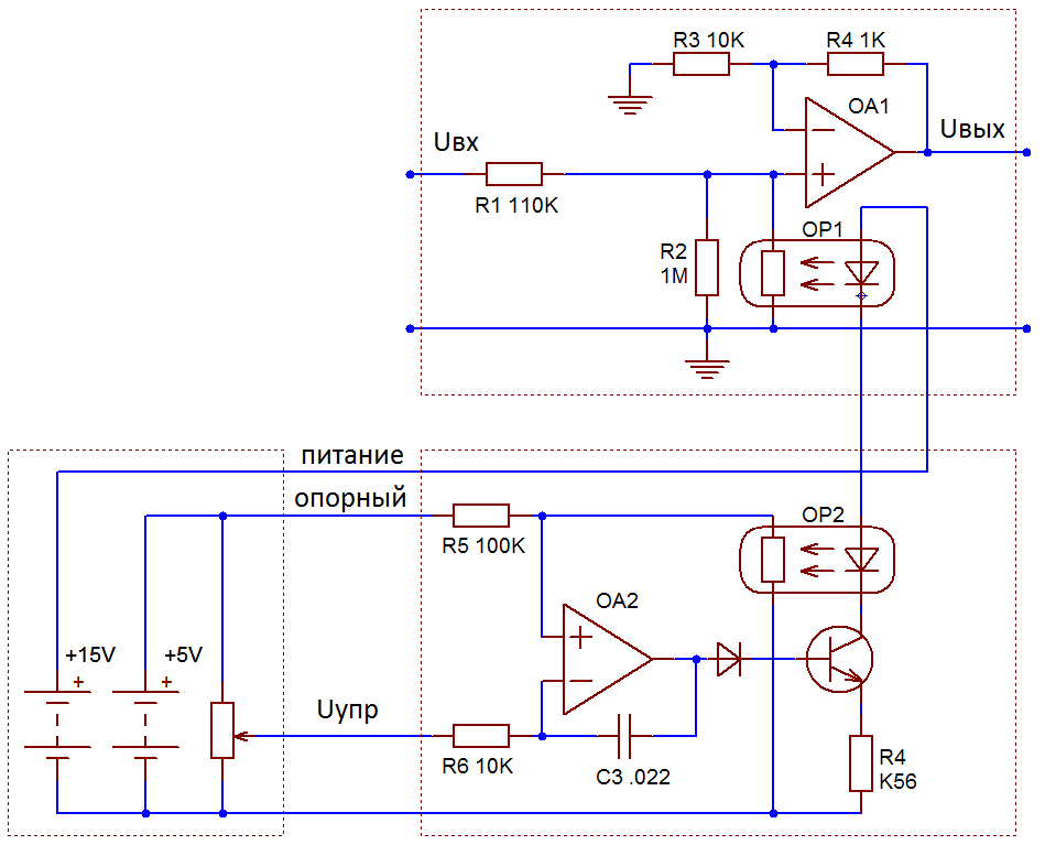 Прецизионный усилитель, управляемый напряжением, на оптопарах. Верхняя по схеме оптопара непосредственно управляет коэффициентом усиления, нижняя (контрольная) отслеживает фактическое сопротивление первой и задаёт сигнал ошибки общего для обеих оптопар драйвера на нижнем ОУ.